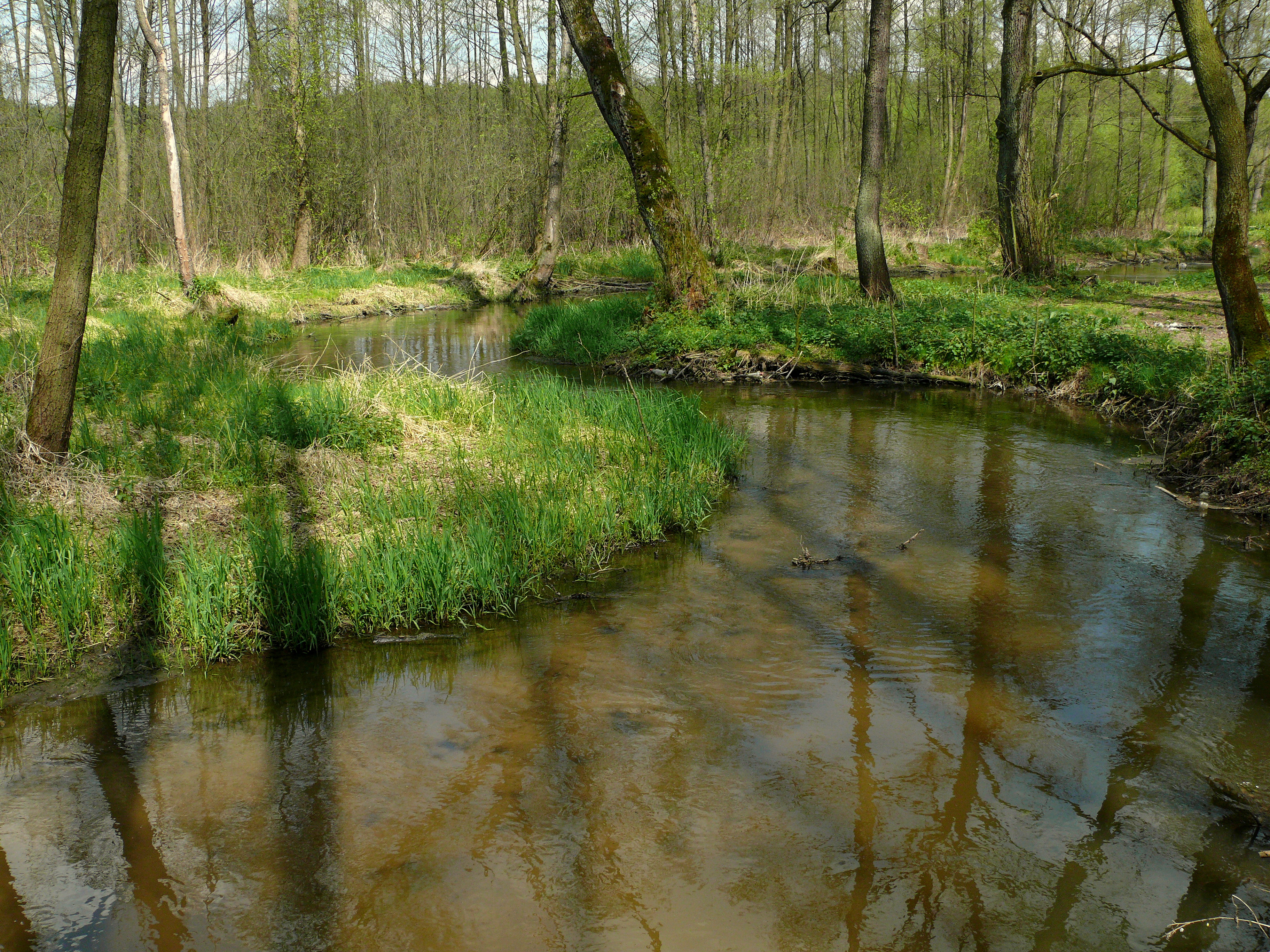 Meandry Krępianki w okolicach wsi Dziurków